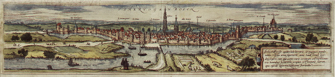 's-Hertogenbosch